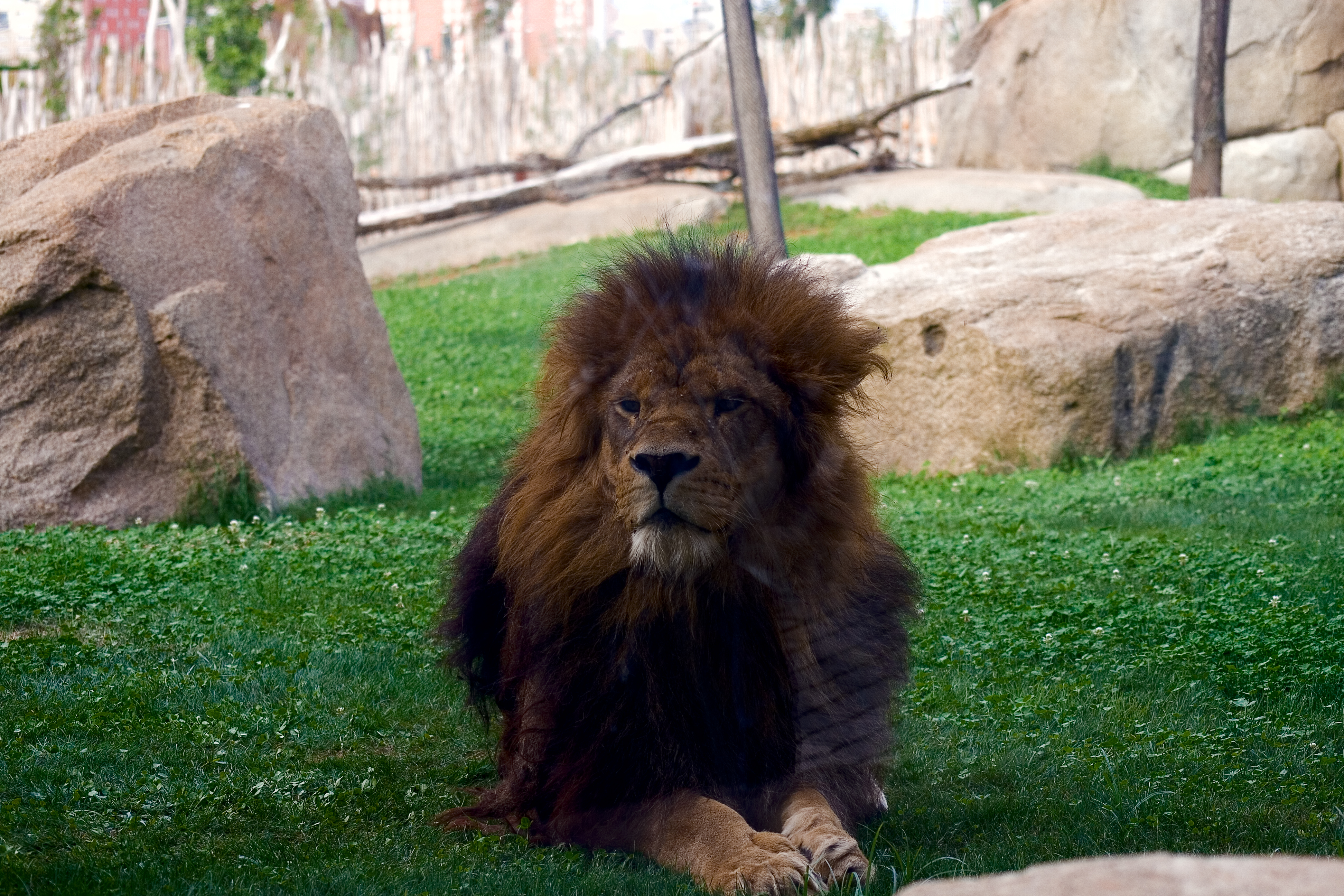 Leon - Bioparc Valencia